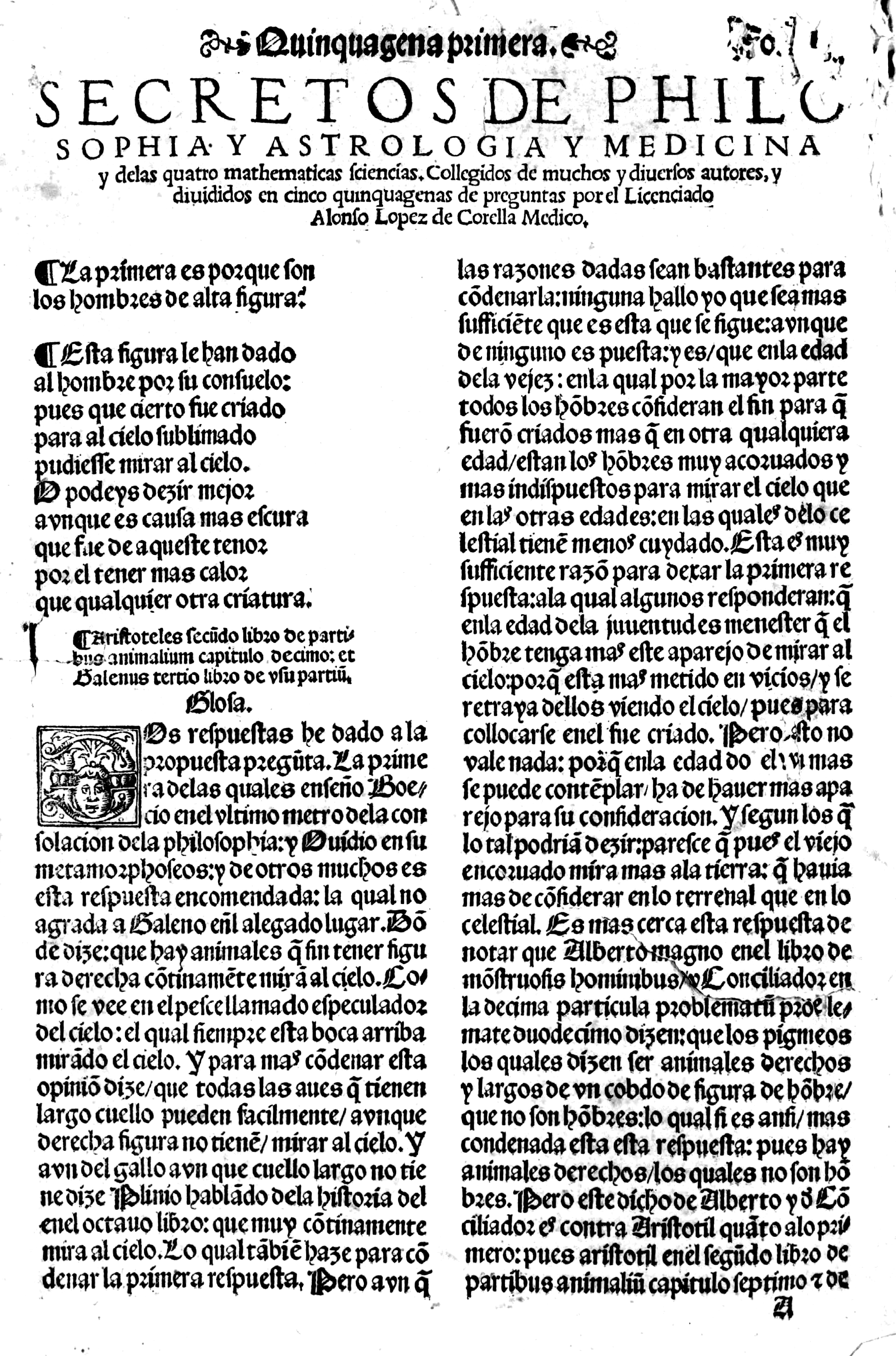 Alonso López de Corella, Secretos de Philosophia y Astrologia y Medicina y de las quatro mathematicas Sciencias..., Çaragoça, Jorge Coci a costas de Pedro Bernuz, 15 de jul. 1547.